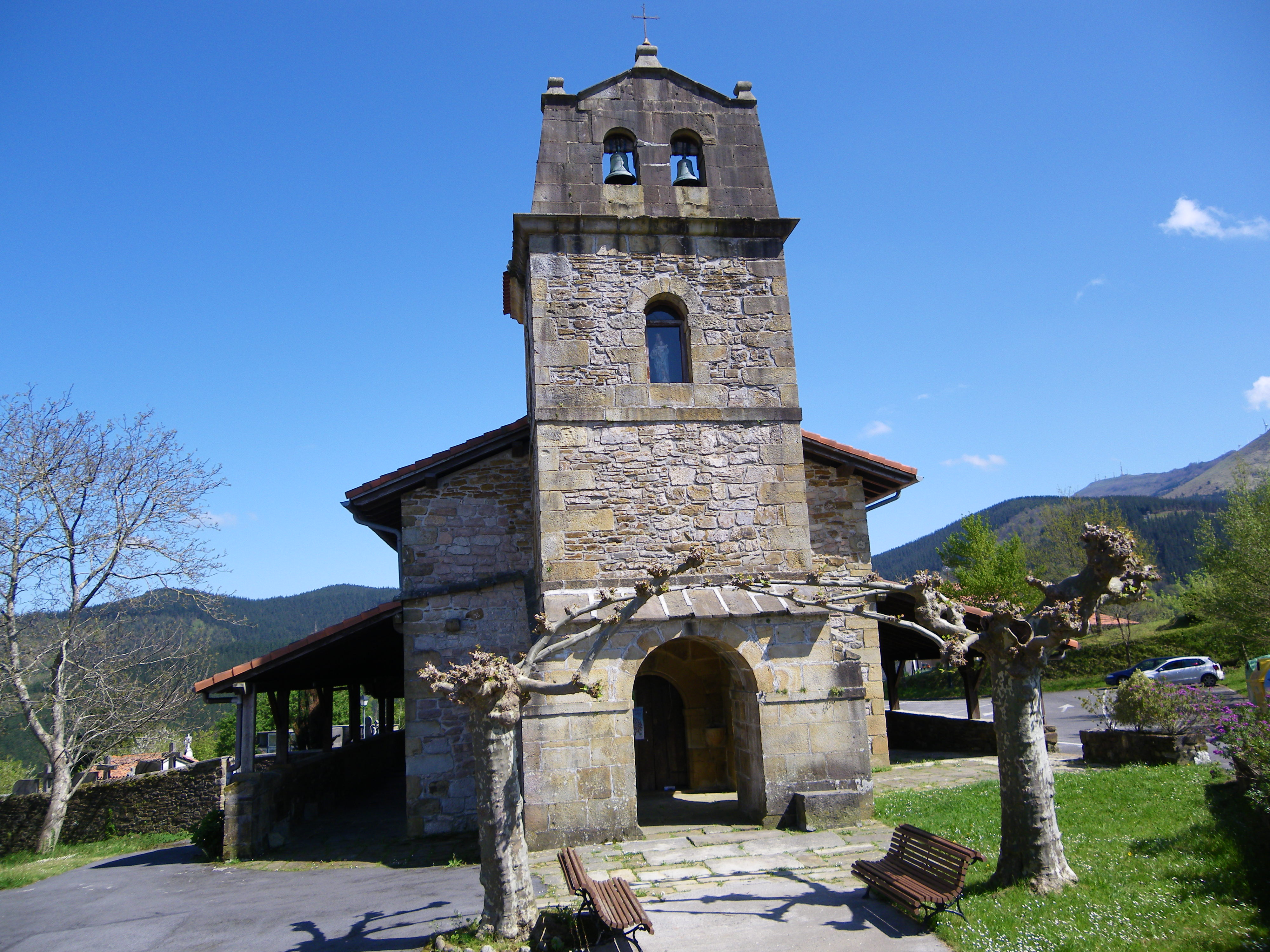 Mari Madalen eliza, Albiz, Mendata, Bizkaia.